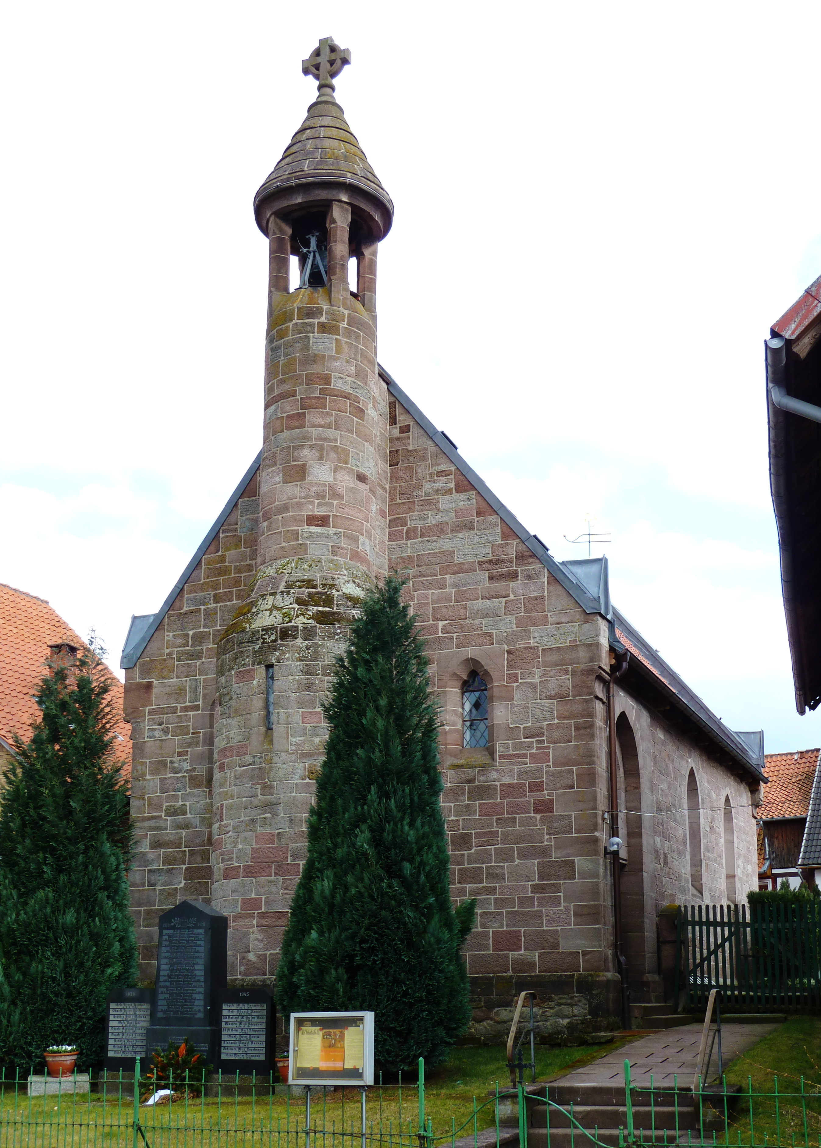 Straßenansicht (Westansicht) der Kapelle in Behrensen, Stadt Moringen, Südniedersachsen. Erbaut 1870 durch Maurermeister Wenig. (Bild leicht perspektivisch entzerrt, allseitig etwas beschnitten und Kontraste leicht erhöht)